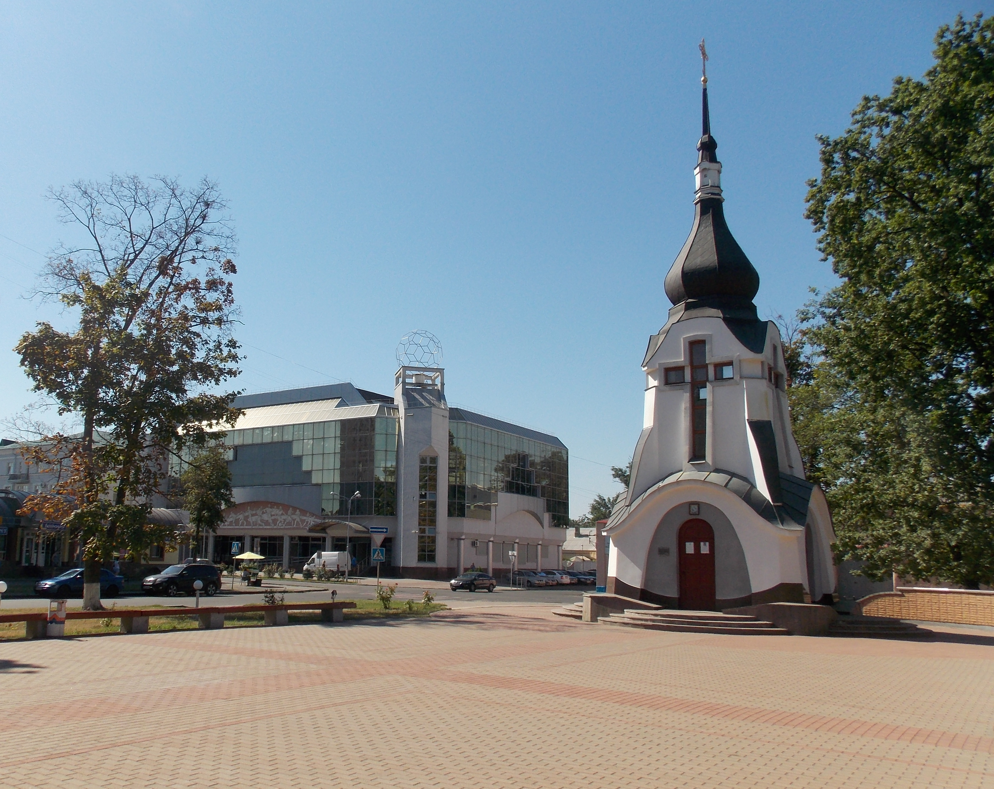 Вулиця Дмитра Коряка близ перехрестя з Лідова. Територія меморіального та спортивного комплексів МВС.